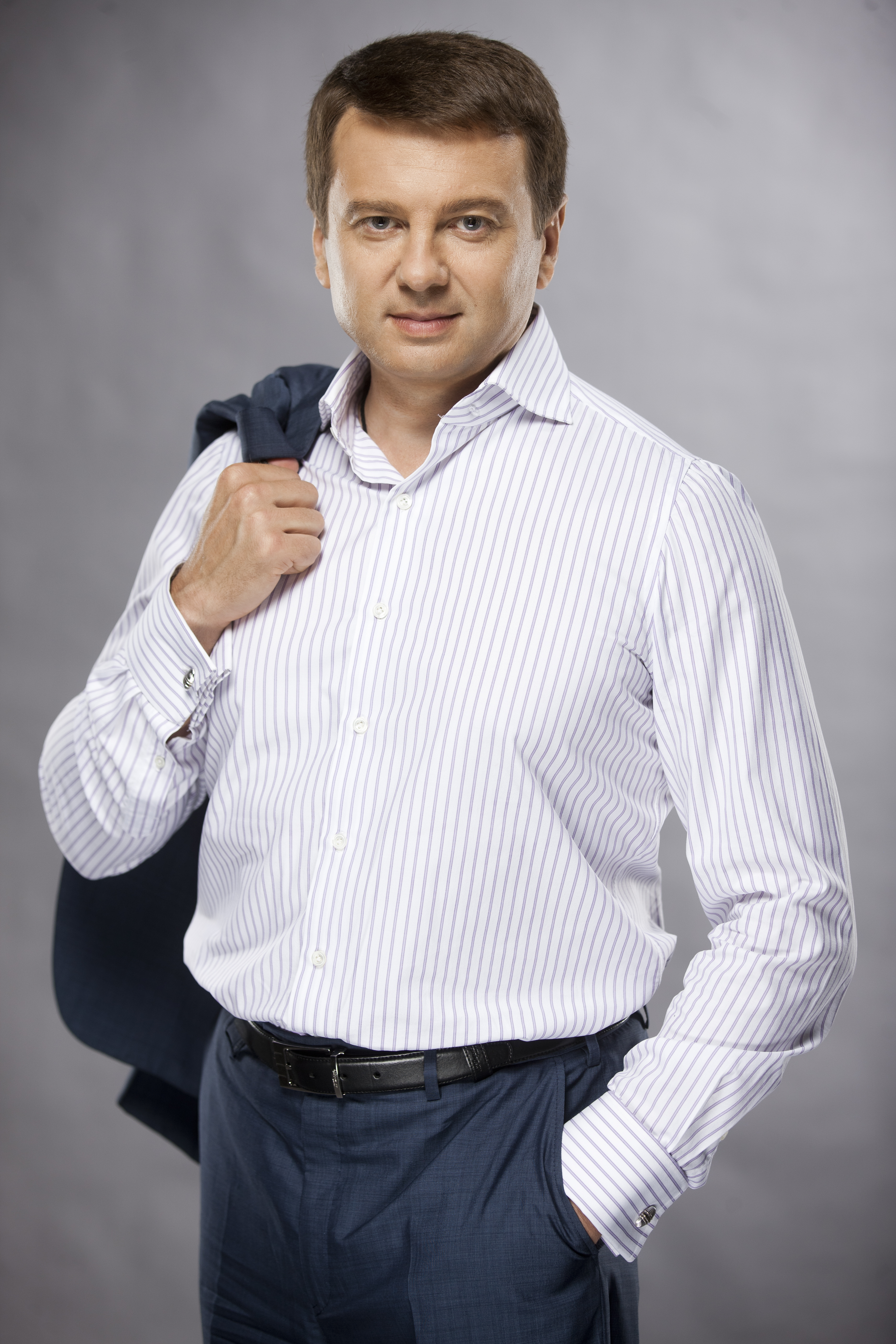 Тимофей Нагорный